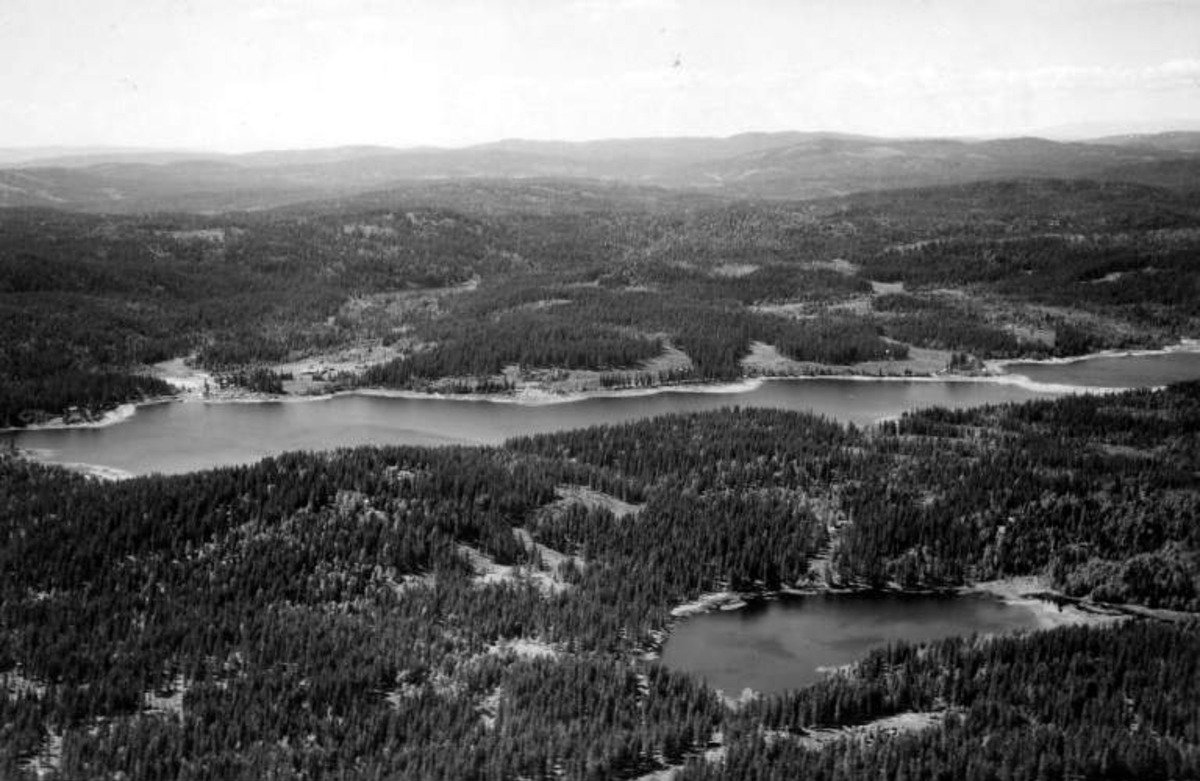 Ørfiske flyfotografert mot vest 1949. Gården Fredrikstad i venstre del av bildet. Skåltjern i forgrunnen.